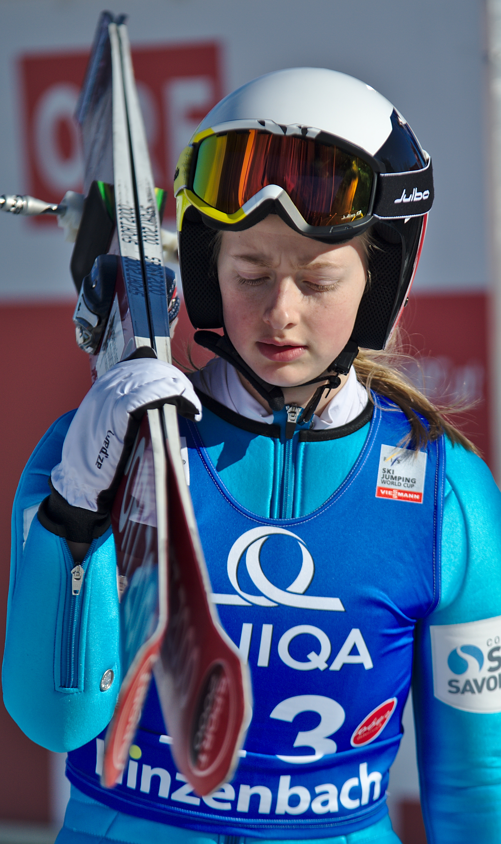 FIS Ski Jumping World Cup Ladies Hinzenbach 2017. Bild zeigt Lucile Morat (FRA)